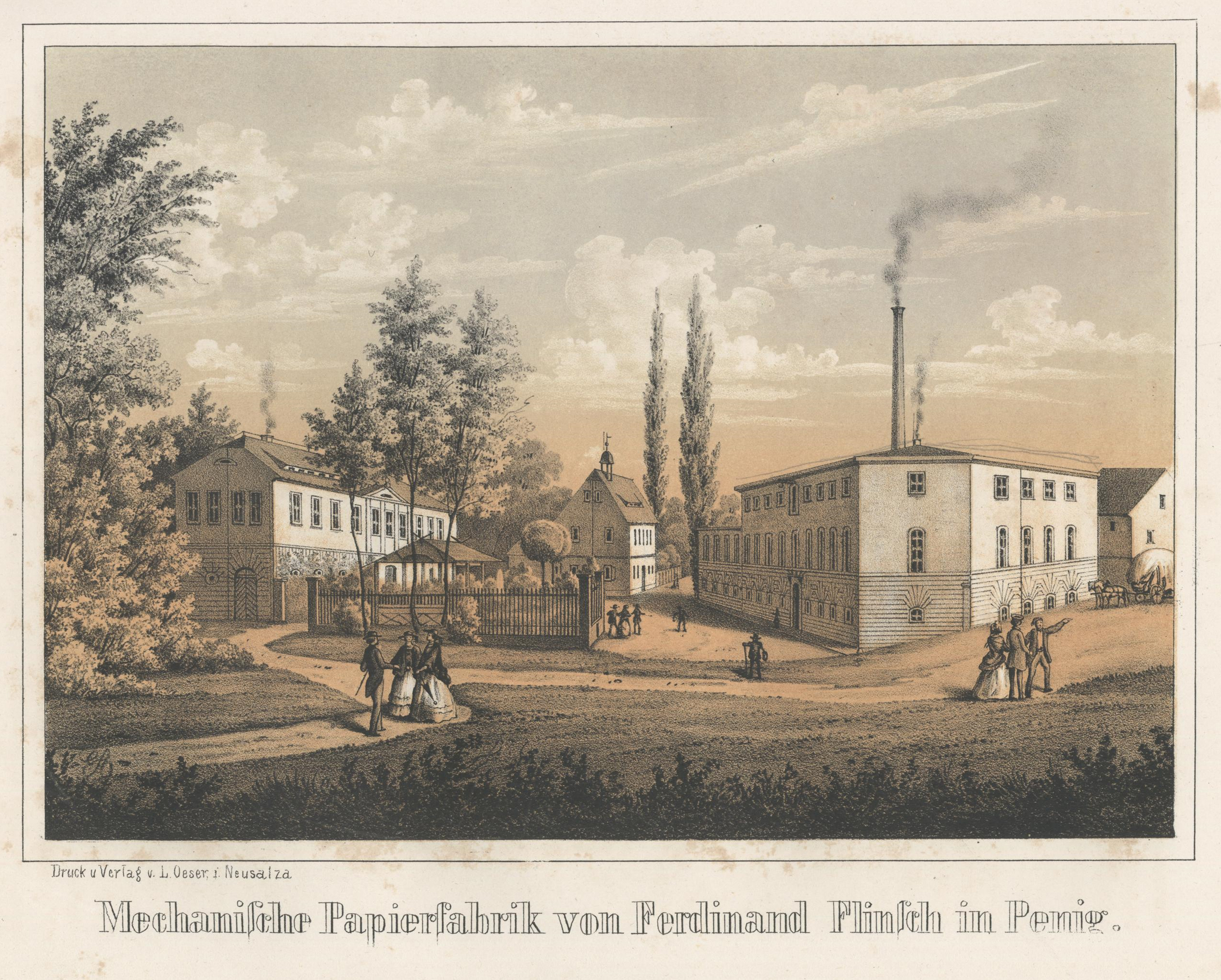 Mechanische Papierfabrik von Ferdinand Flinsch in Penig aus: Album der Sächsischen Industrie Erster Band